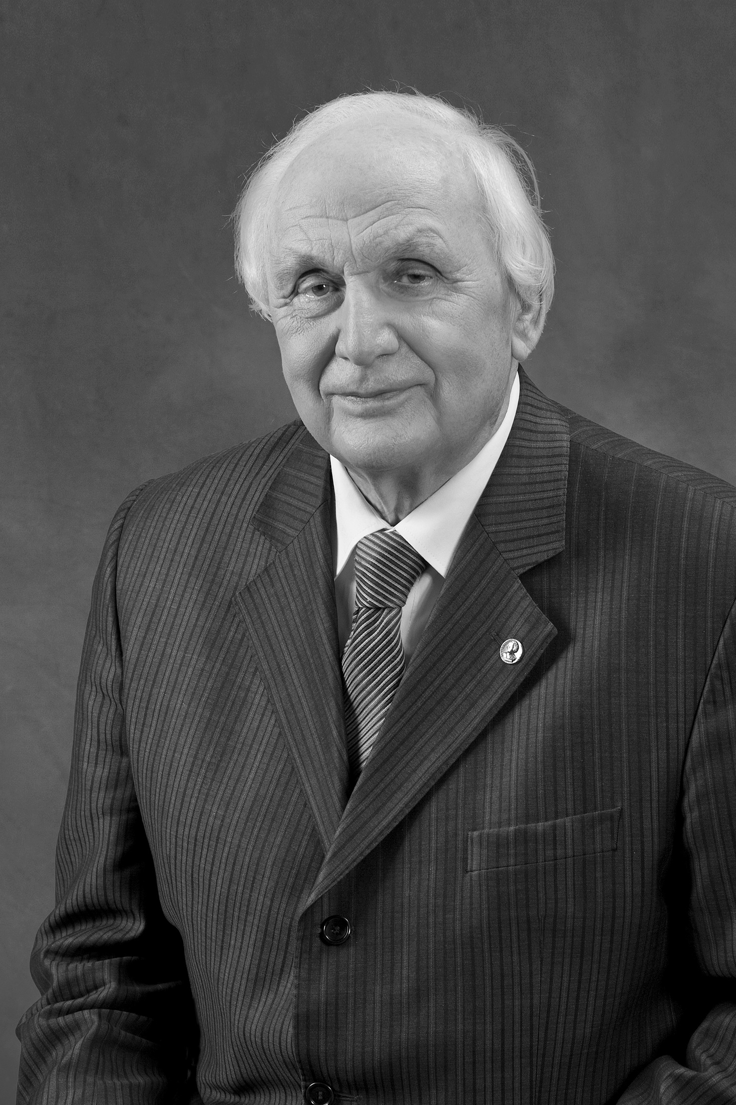 Ильин Владимир Александрович (02.05.1928—26.06.2014). Заведующий кафедрой общей математики факультета ВМК МГУ, профессор, действительный член РАН.